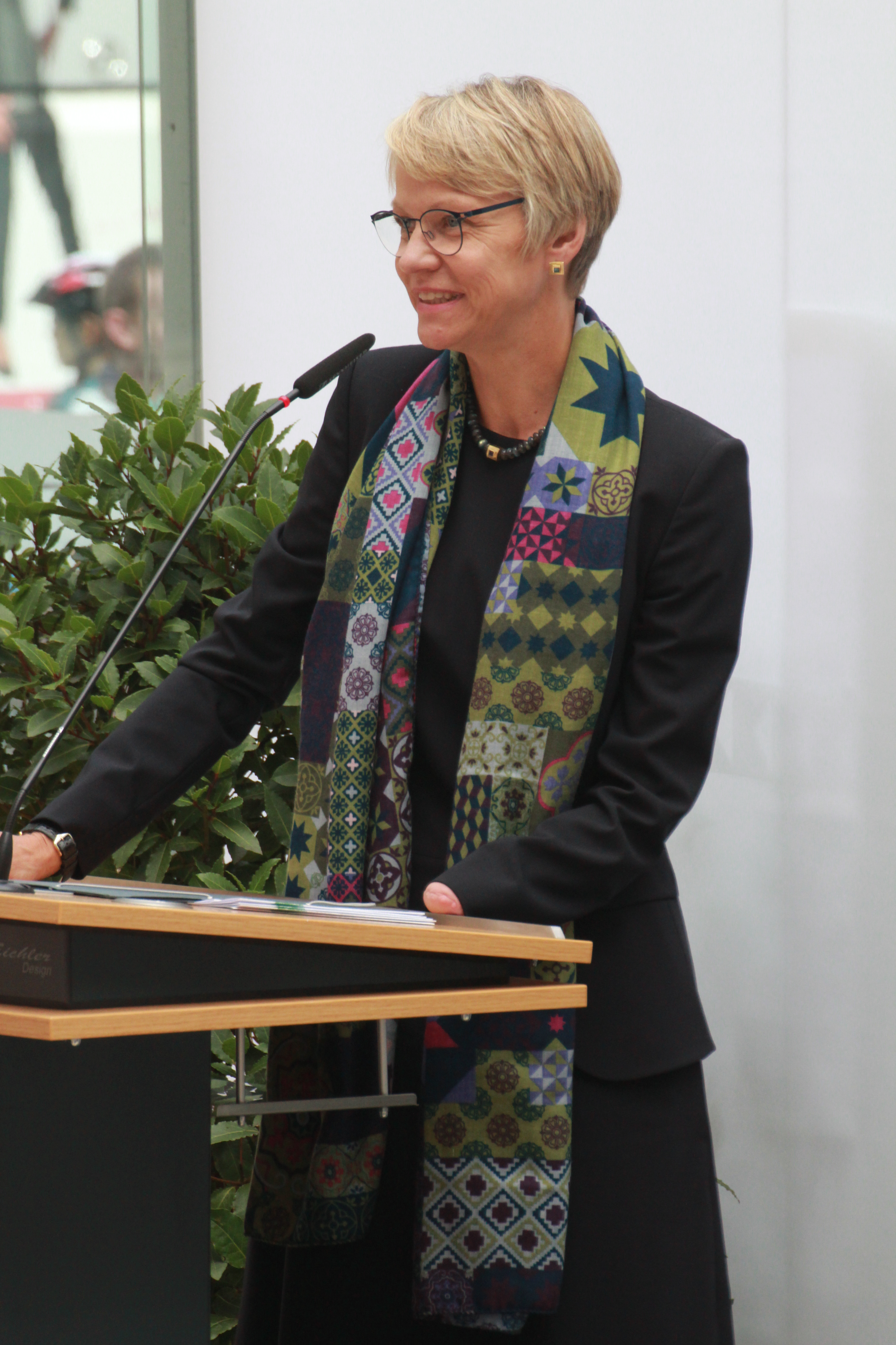 Dorothee Feller, Regierungspräsidentin des Regierungsbezirks Münster, bei ihrer Amtseinführung am 31. August 2017.